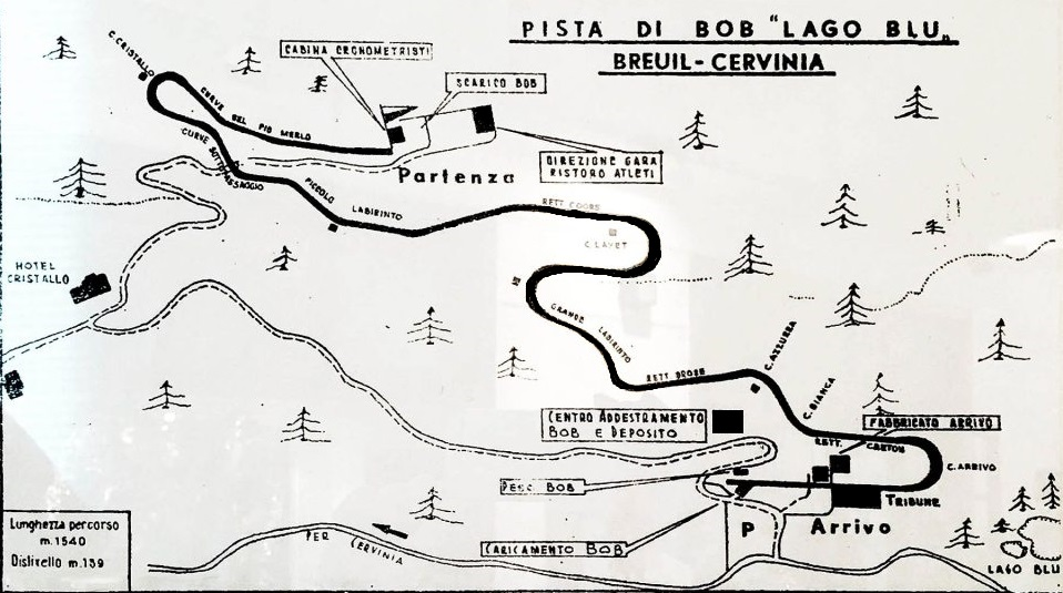 Campionati mondiali di bob 1975